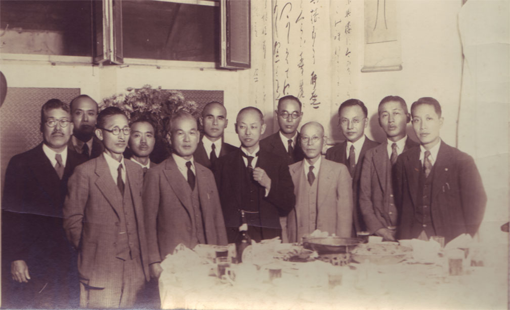 中央の握り拳の人物が満州重工業総裁時代の鮎川義介。日産グループ駐在員による「鮎川総裁訪支歓迎宴」にて。 撮影日 1939年10月10日 撮影場所 北京市内「東興楼」 撮影者 不明